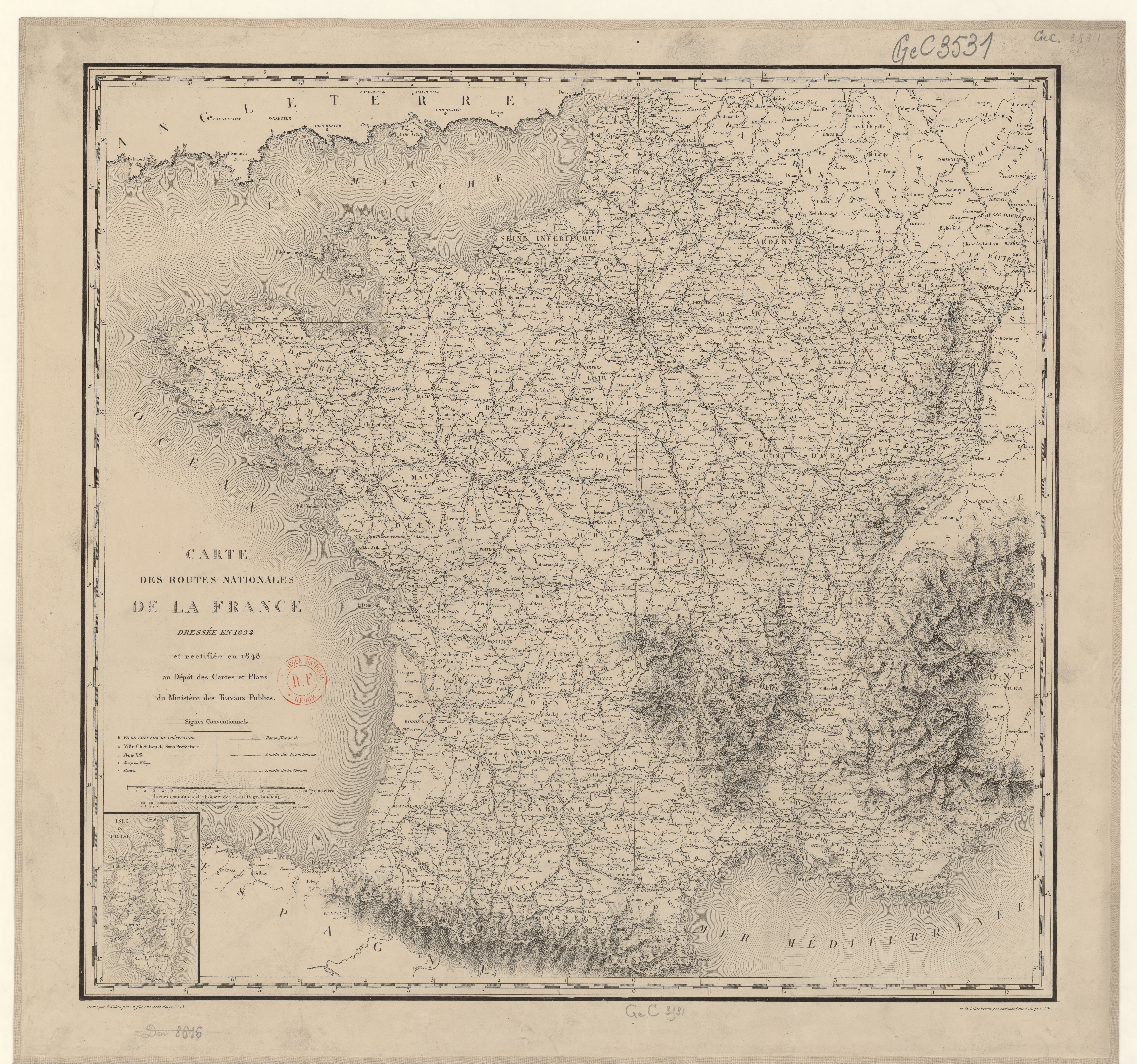 Carte des routes nationales de la France dressée en 1824 et rectifiée en 1848